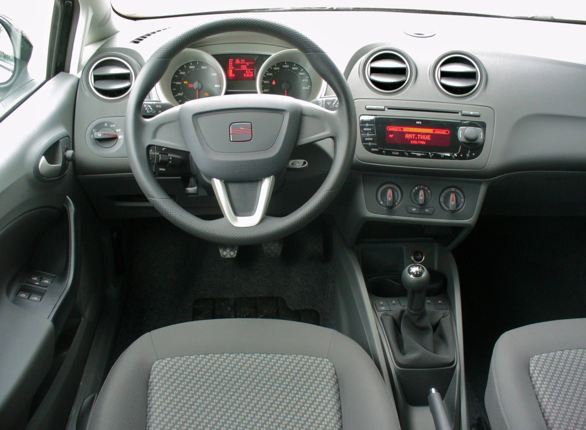 SEAT Ibiza 6J interior